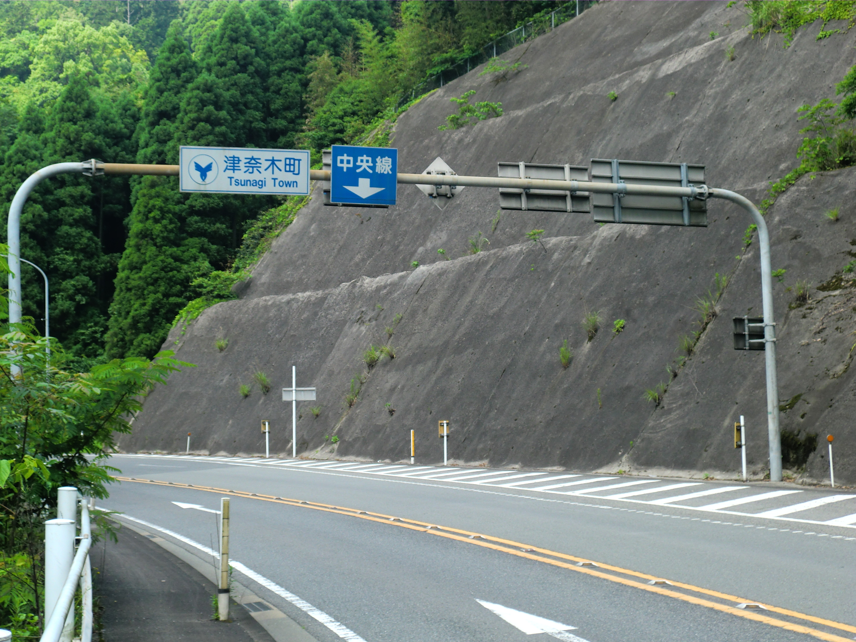 国道3号線上にある熊本県芦北町と熊本県津奈木町の境界標識